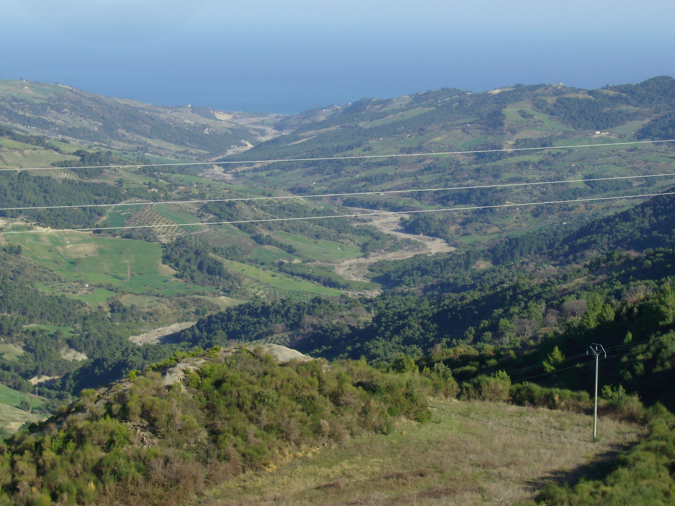 Letto della fiumara Avena